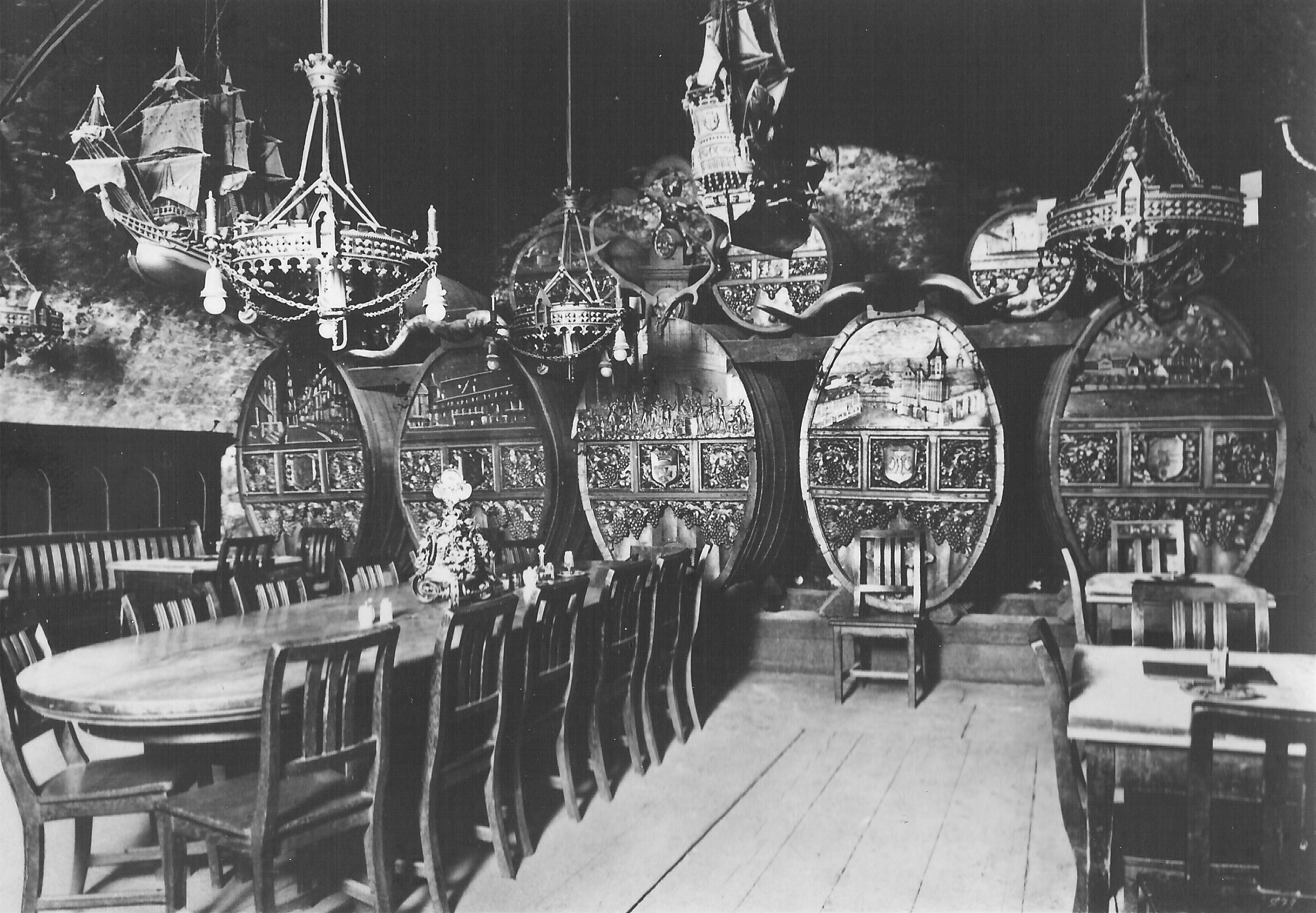 Die Große Halle des Blutgerichtes in Königsberg mit den fünf Prunkfässern.